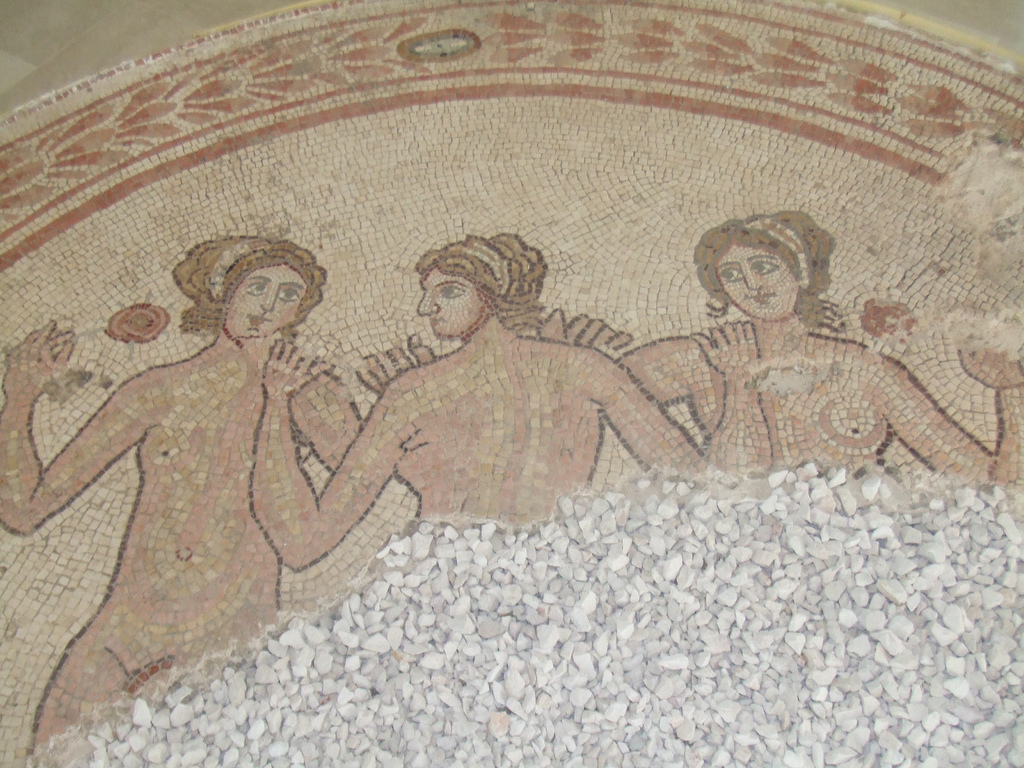 Mosaico romano presente all'interno del Museo Archeologico Nazionale di Egnazia. Mosaico di età romana dalla basilica. Mosaico romano presente all'interno del Museo.